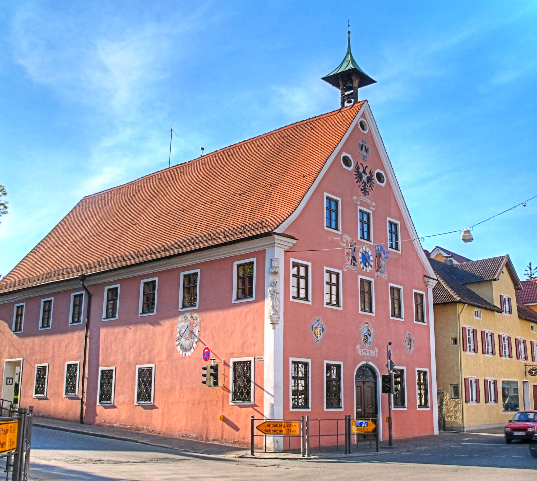 Deutschland, Bayern, Landkreis Landsberg am Lech, Dießen am Ammersee, Rathaus, HDR-Image